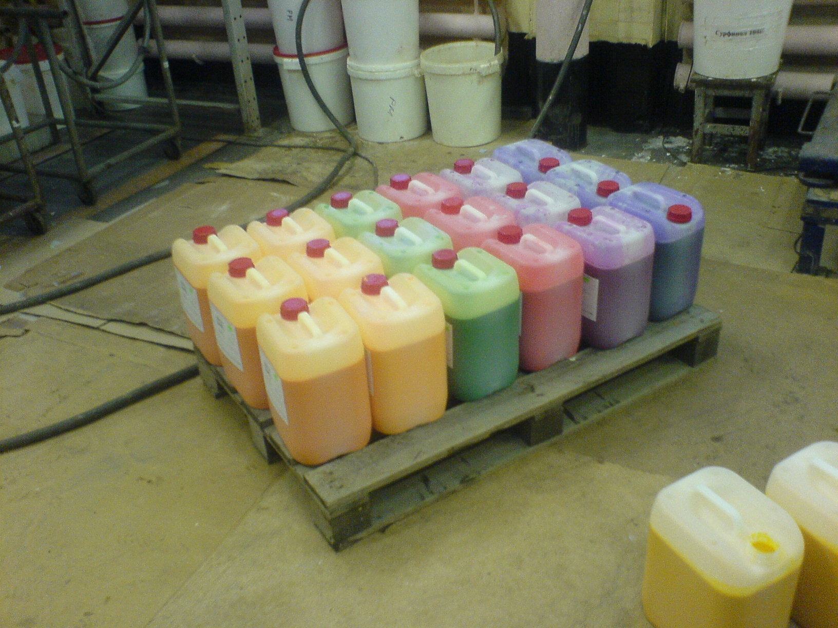 Лакокрасочные материалы (грунты-красители воднодисперсионные акрилатные, для работ по дереву) сразу после производства.